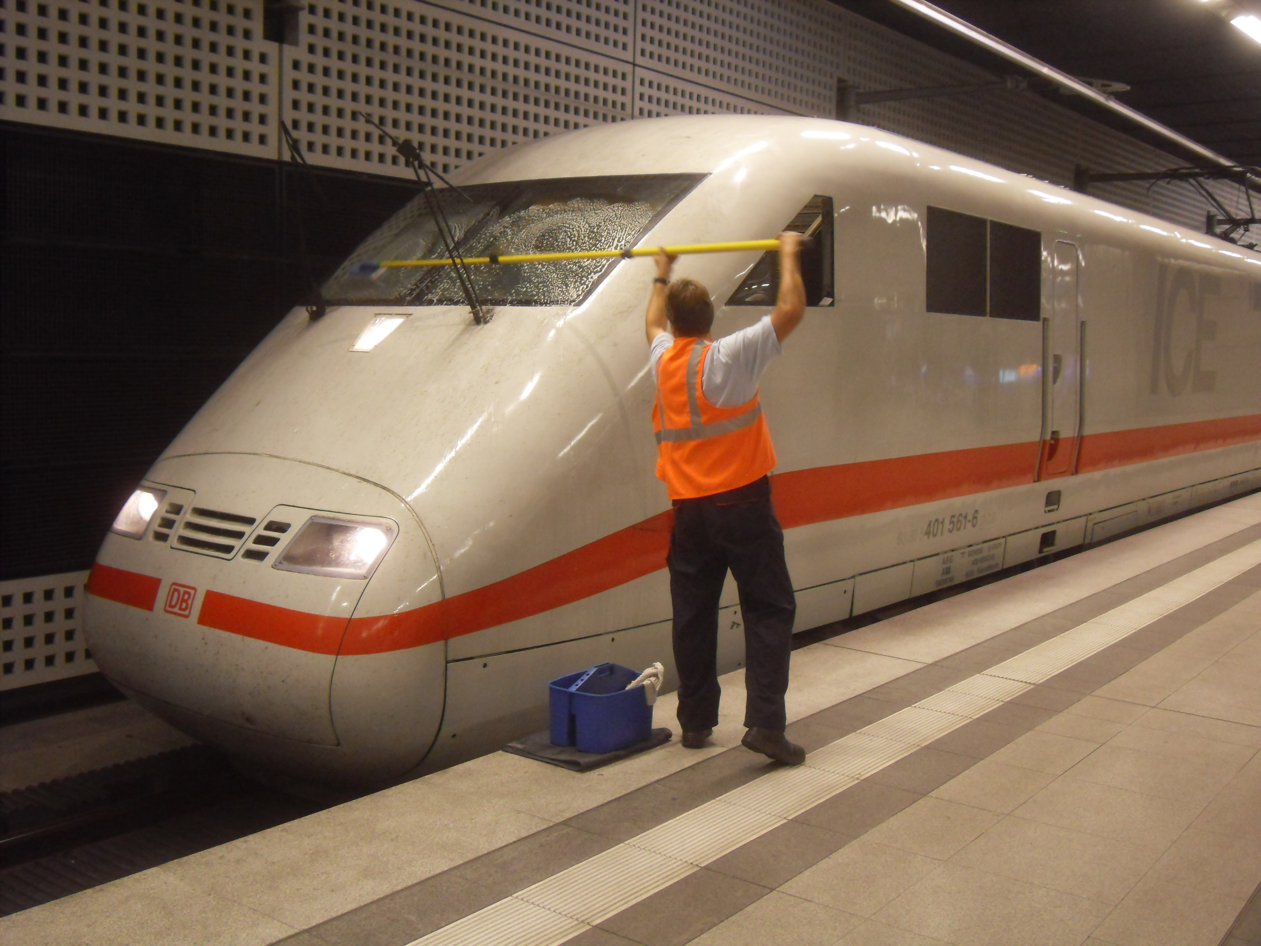 Zugreiniger mit ICE 401 561-6 (Tz 61, Bebra) im Berliner Hauptbahnhof